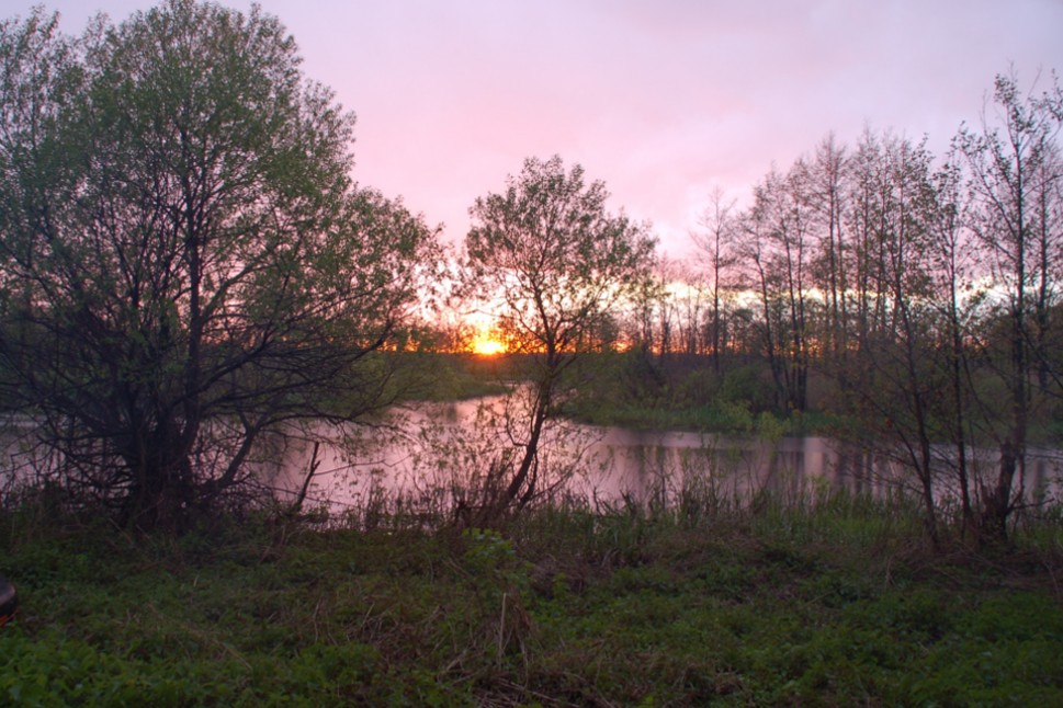 Rzeka Lwa - 1 km przed puszczą olchową. Białoruś - Polesie Prypeckie